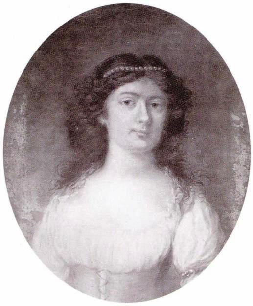 Taidemaalari Lovisa Charlotta Malm-Reuterholm (1768-1845)